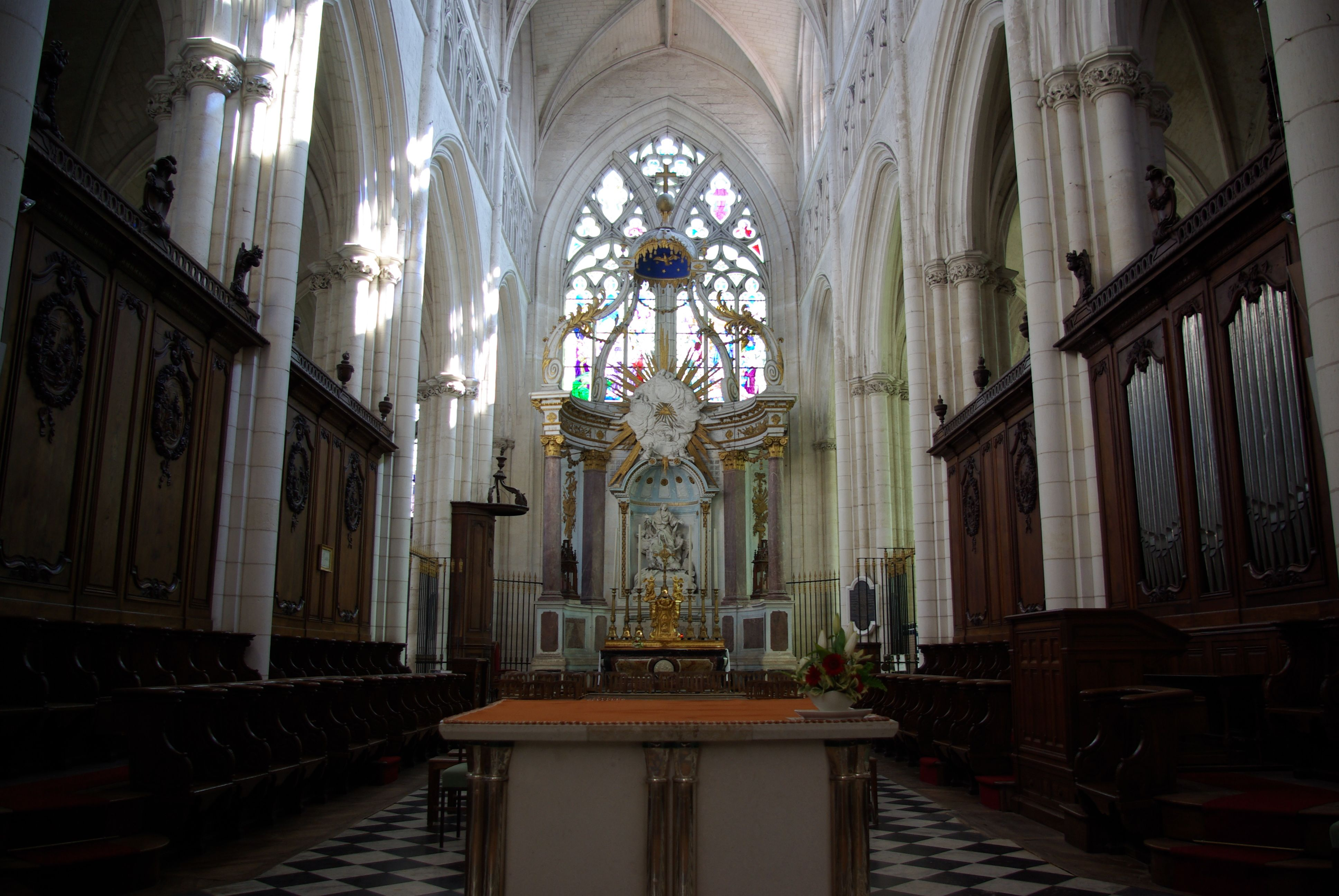 Luçon, Frankreich, Cathédrale Notre-Dame-de-l'Assomption de Luçon, der Hochaltar in der Catherale.